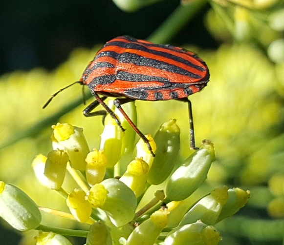 Graphosoma italicum kakarraldoa Uliako mintegietako parkean 2019an